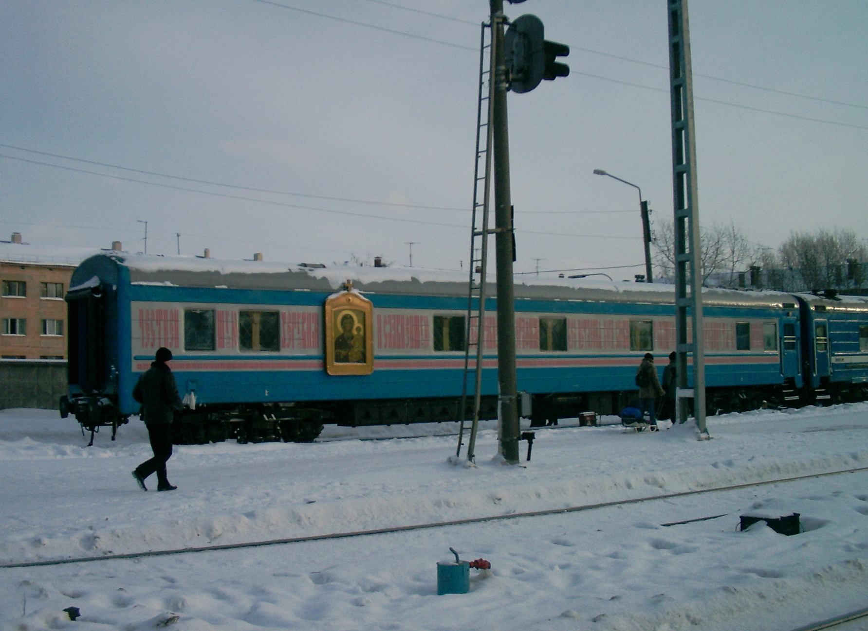 Вагон-церковь во имя иконы "Одигитрия" на ж/вокзале в Петрозаводске